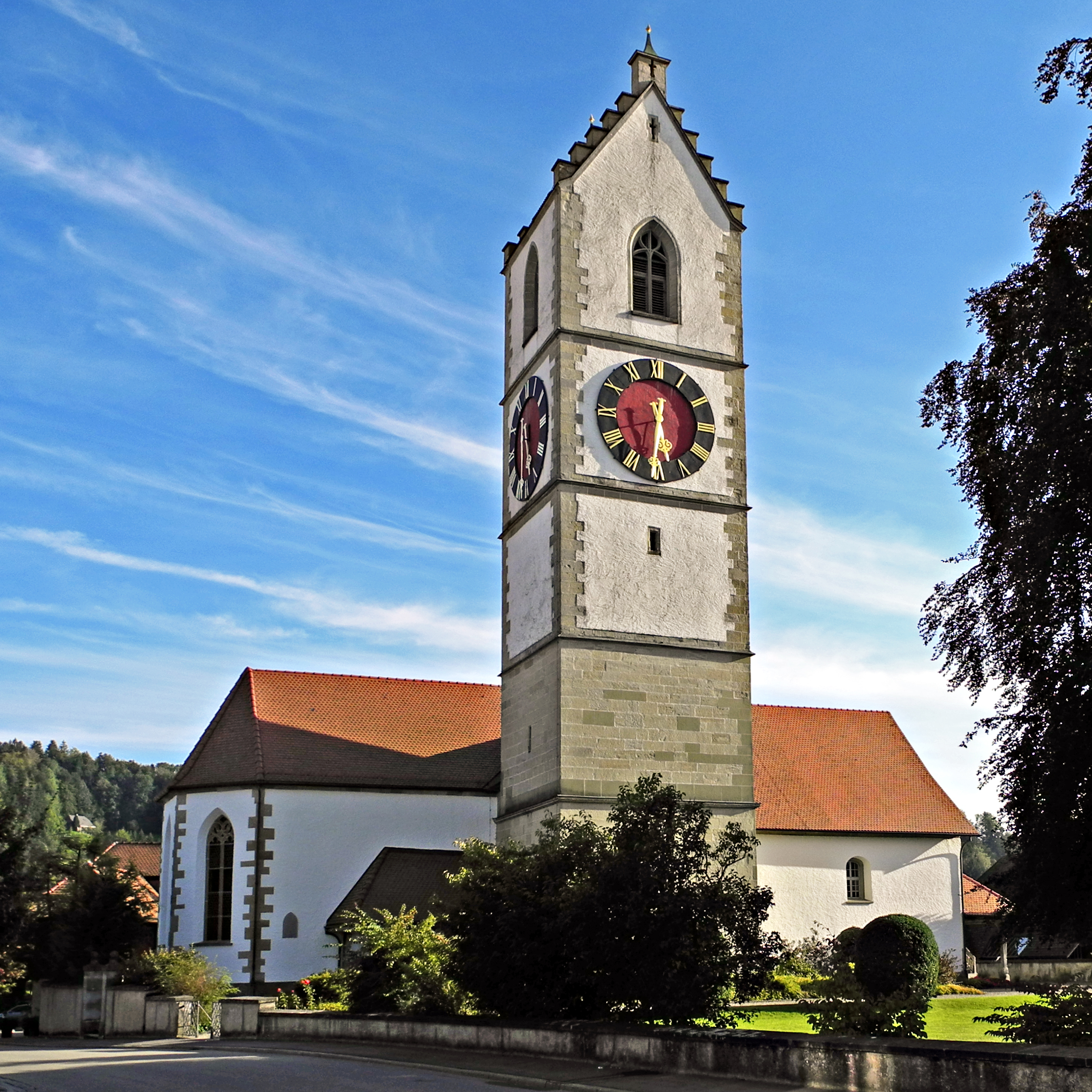 Reformierte Kirche Sumiswald im Kanton Bern, Gesamtansicht